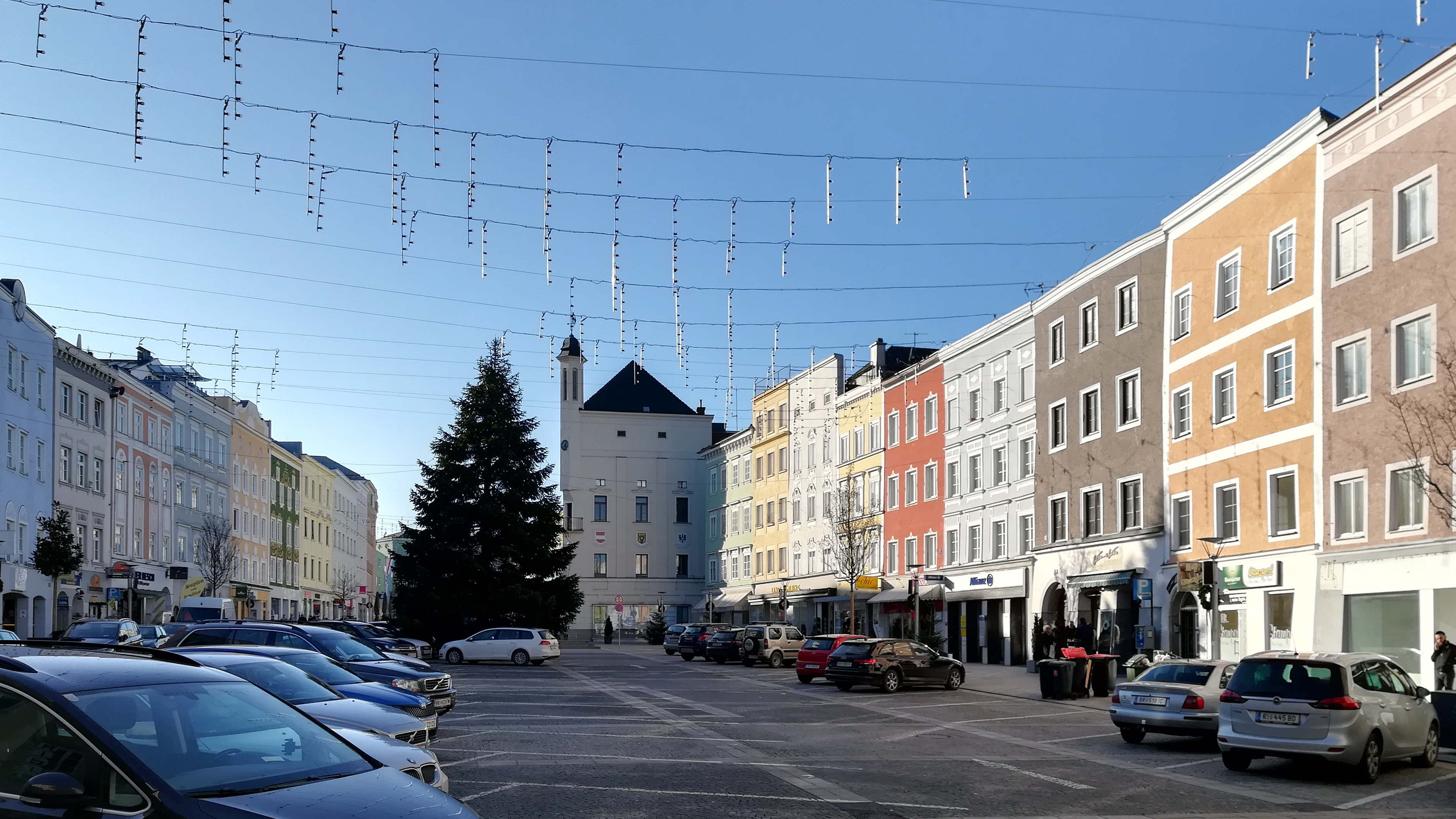 Historischer Hauptplatz von Ried im Innkreis.